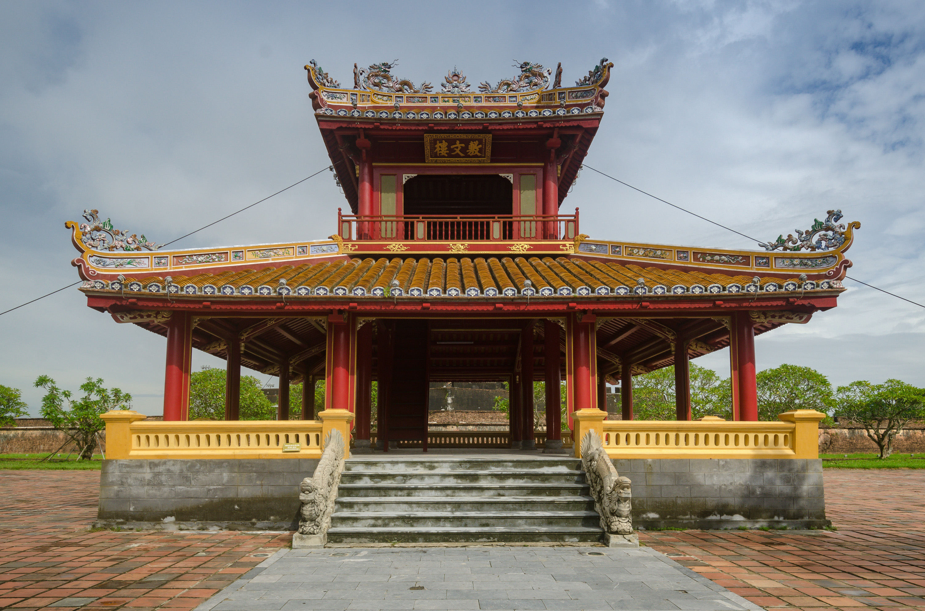 Phu Văn lâu (hay còn gọi là lầu Phu Văn) là một tòa lầu nằm trên trục chính của Hoàng thành Huế. Từ Kỳ đài nhìn ra sông Hương có hai công trình kiến trúc tô điểm cho bộ mặt của Kinh thành Huế. Một trong hai công trình ấy là Phu Văn lâu (phu: trưng bày, văn: văn thư, lâu: lầu) - Cái lầu trưng bày văn thư của triều đình. Phu Văn lâu được xây dựng vào năm 1819 dưới thời vua Gia Long, dùng làm nơi niêm yết những chỉ dụ quan trọng của nhà vua và triều đình, hoặc kết quả các kỳ thi do triều đình tổ chức. Năm 1829, vua Minh Mạng dùng nơi đây làm địa điểm tổ chức cuộc đấu giữa voi và hổ. Năm 1830, nhà vua này lại tổ chức cuộc vui chơi yến tiệc suốt 3 ngày để mừng sinh nhật của mình.